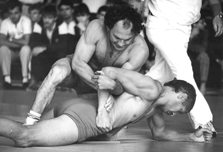 Hartmut Reich, Olaf Tölle ADN-ZB Kasper 19.6.88-kb Bez. Gera: DDR-Meisterschaften im Ringen in Jena-Finale Freistil-DDR-Meister im Bantamgewicht wurde Hartmut Reich (SC Motor Jena). Durch Schultersieg bezwang er Olaf Tölle (SC Chemie Halle, am Boden).